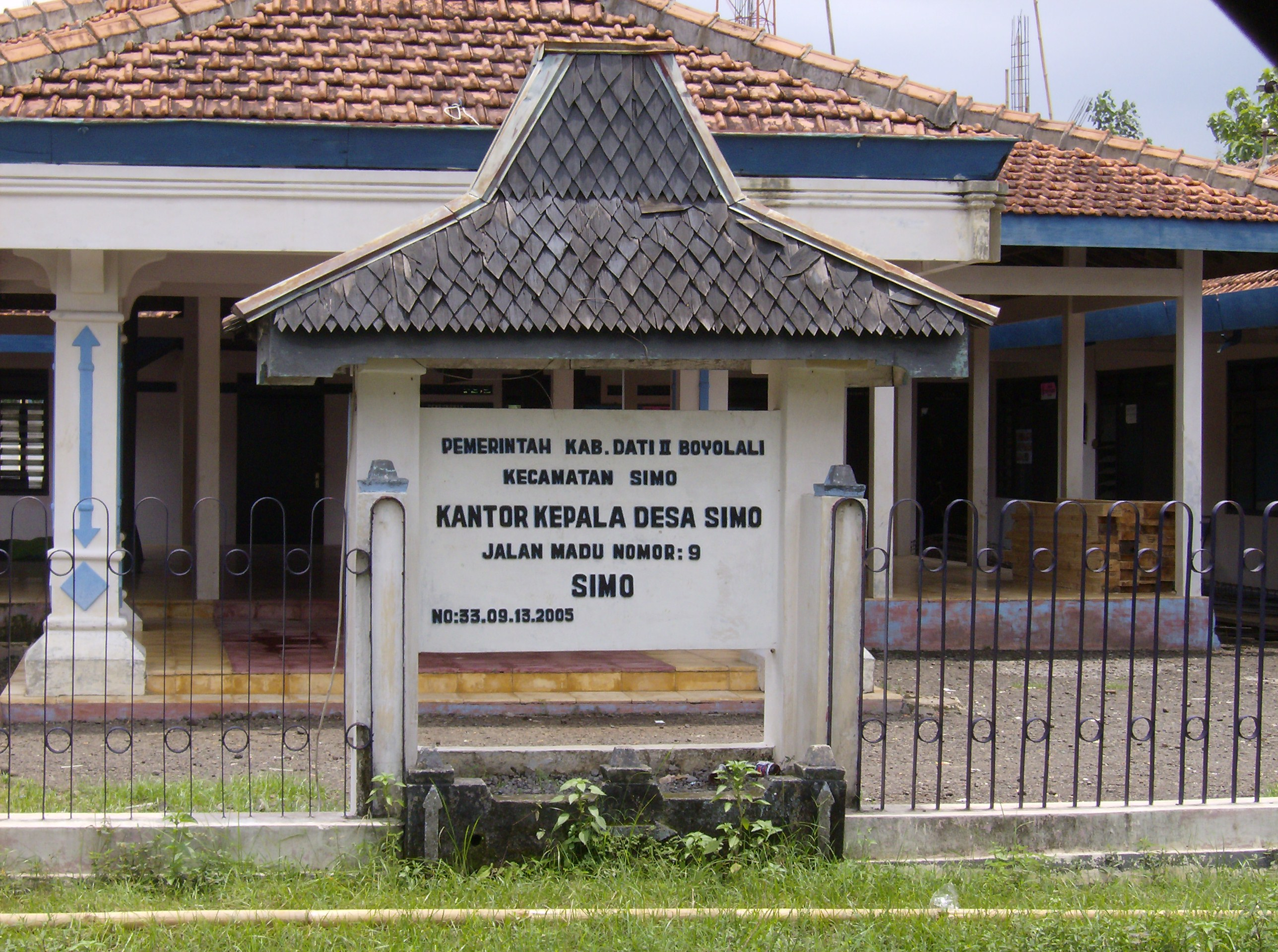 Made by Meursault2004 aka Revo Arka Giri Soekatno